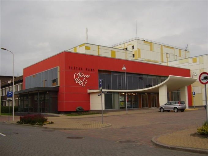 jkgjhyghk